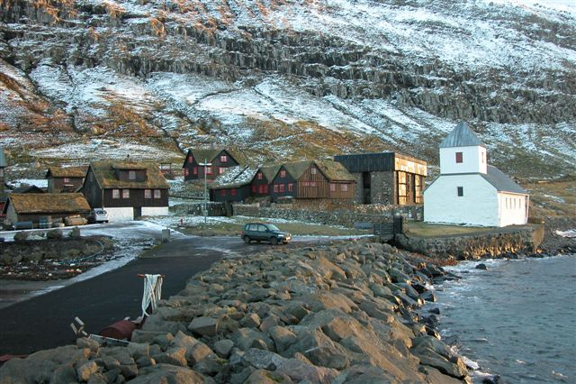 Kirkjubøur